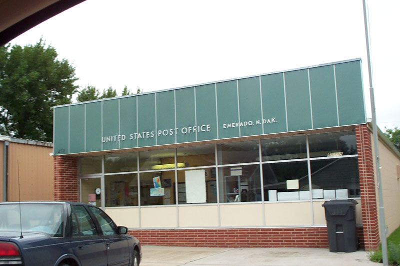 Emerado, North Dakota. From .